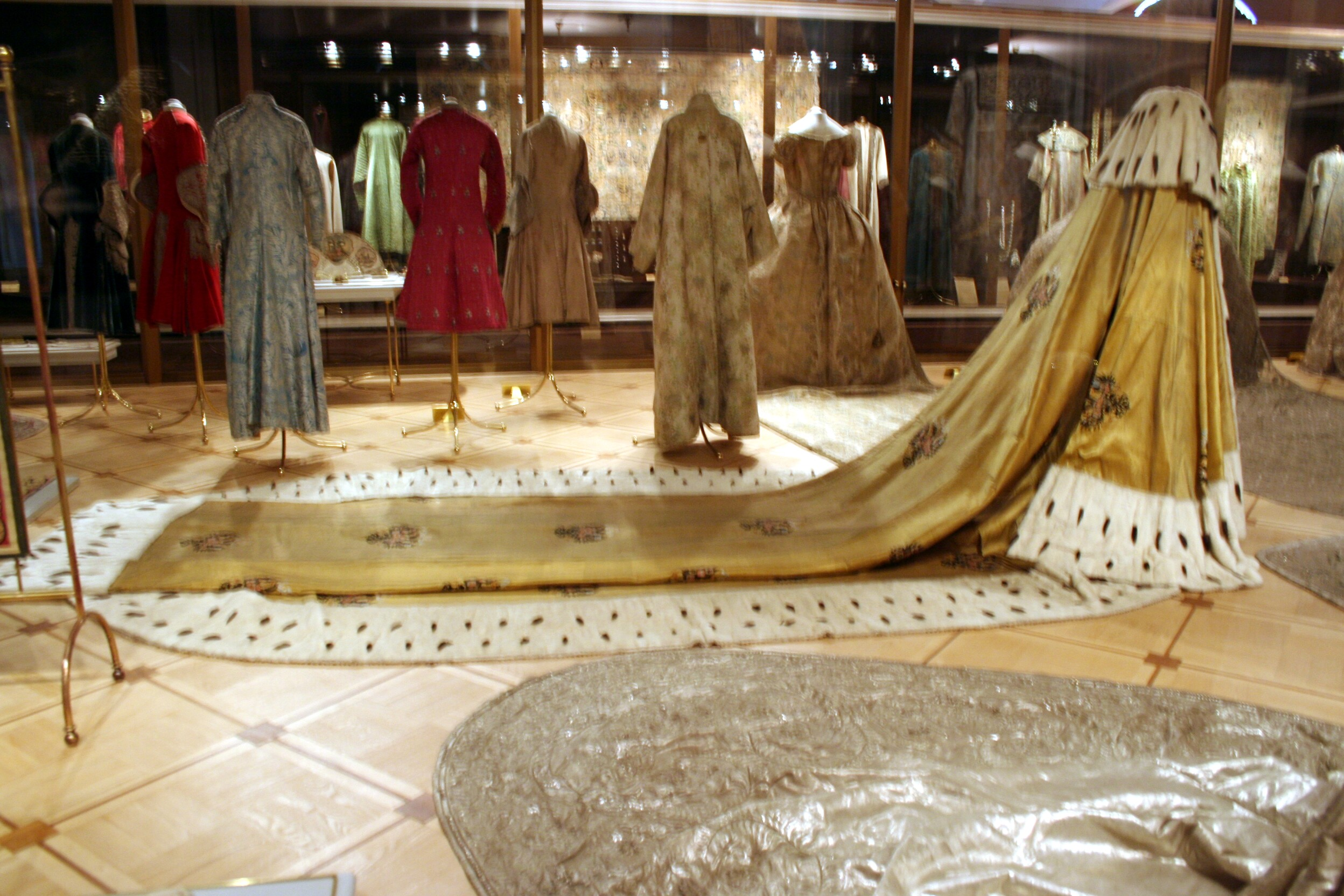 Museo de la Armería estatal, Oruzbeynaya palata, en el Kremlin